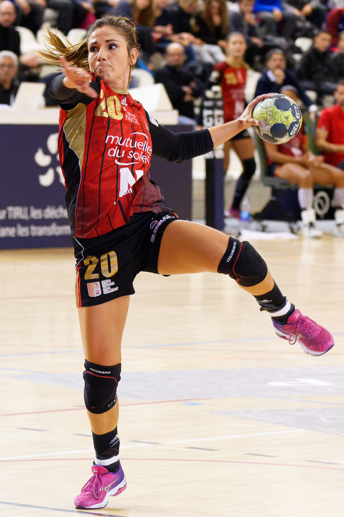 Rencontre Issy Paris Hand / OGC Nice. A Issy Les Moulineaux, le 8 novembre 2017.